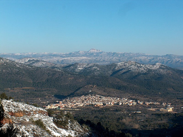 Artana (Plana Baixa), amb la serra d'Espadà nevada i al fons el Penyagolosa (Comunitat Valenciana)